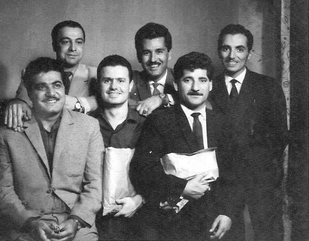 کوردی: دیلان و چەند هاوڕێیەکی